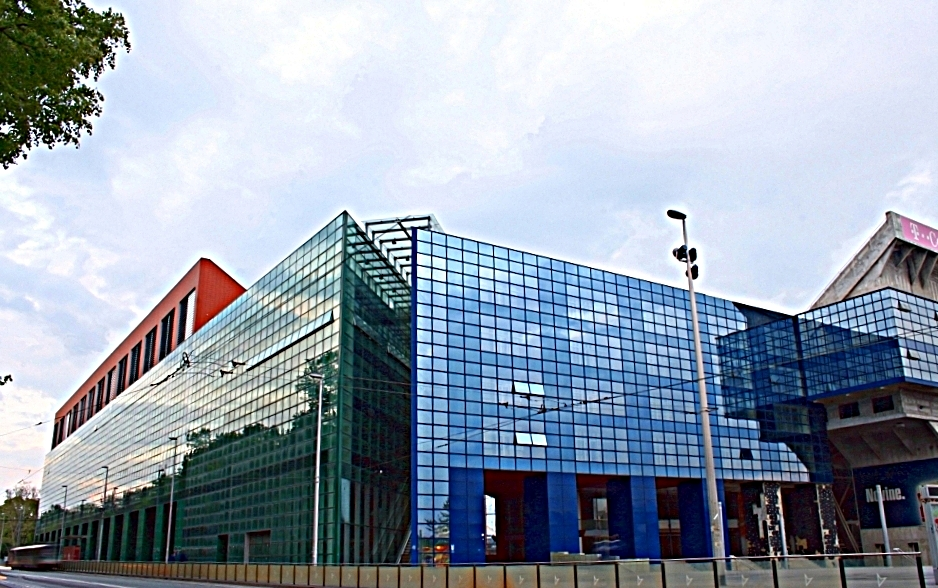 Maksimirski stadion, Zagreb